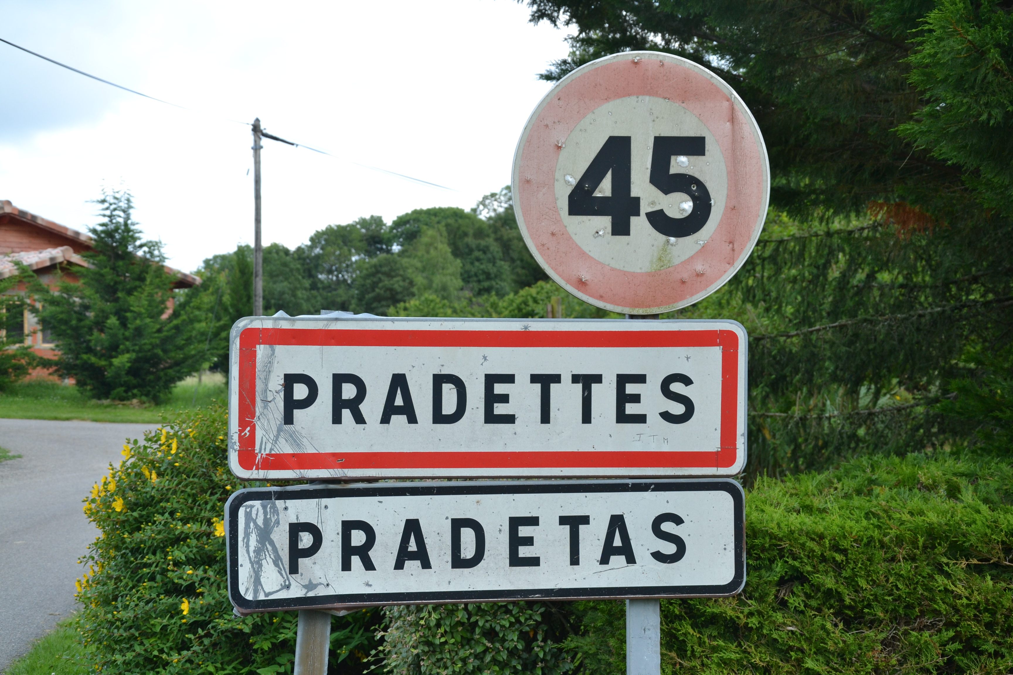 Panneau d'entrée d'agglomération bilingue français-occitan, Pradettes (Ariège, France).